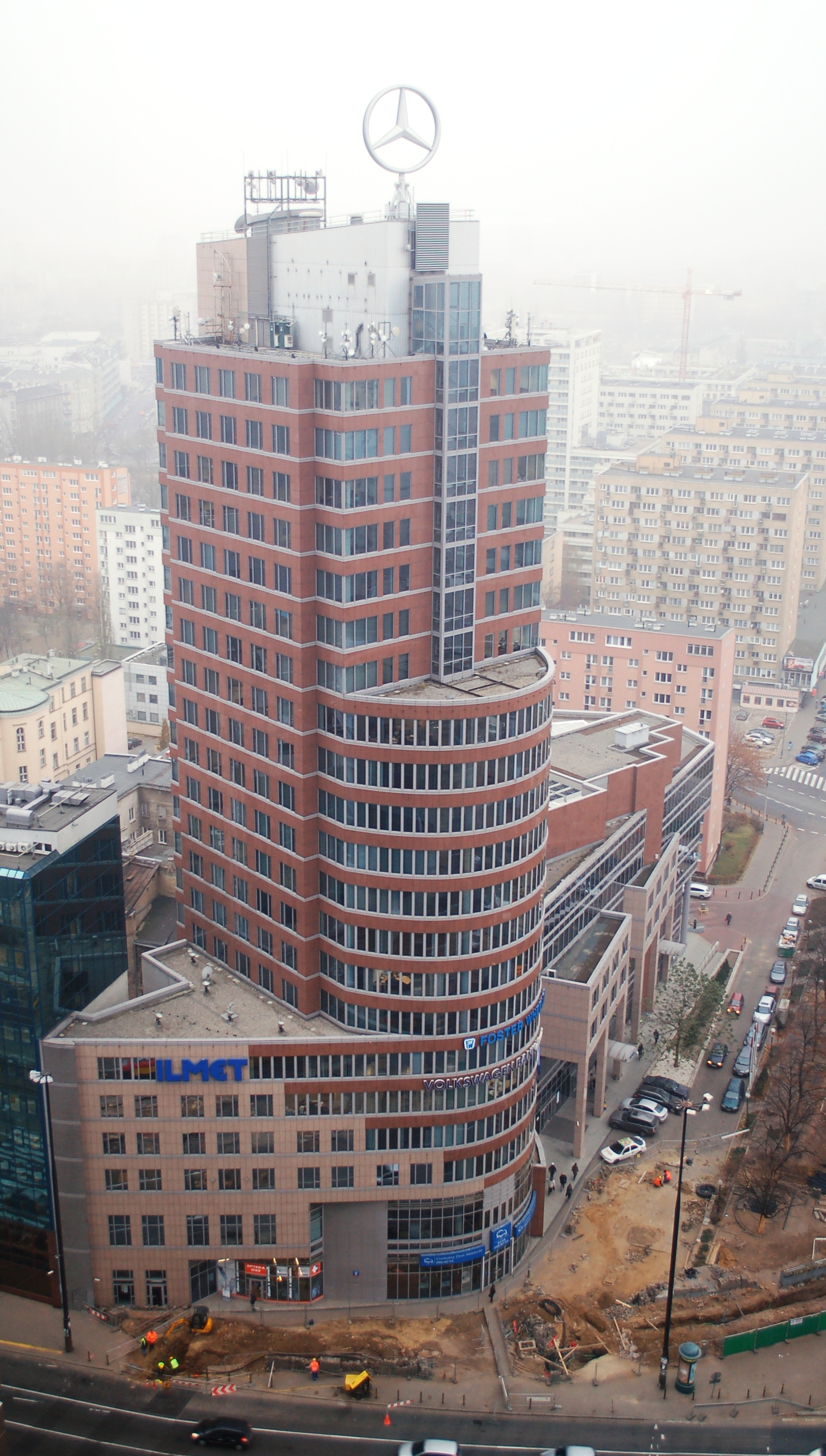 Metro construction, Warsaw